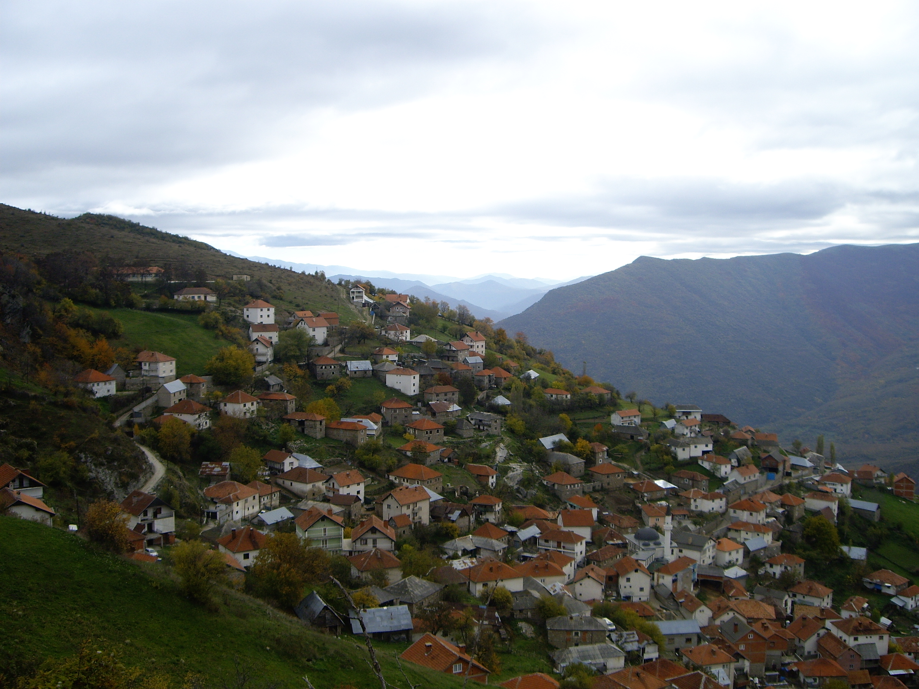 Фотографии од триесет и деветтата тура на групата Macedonian Bike Riders